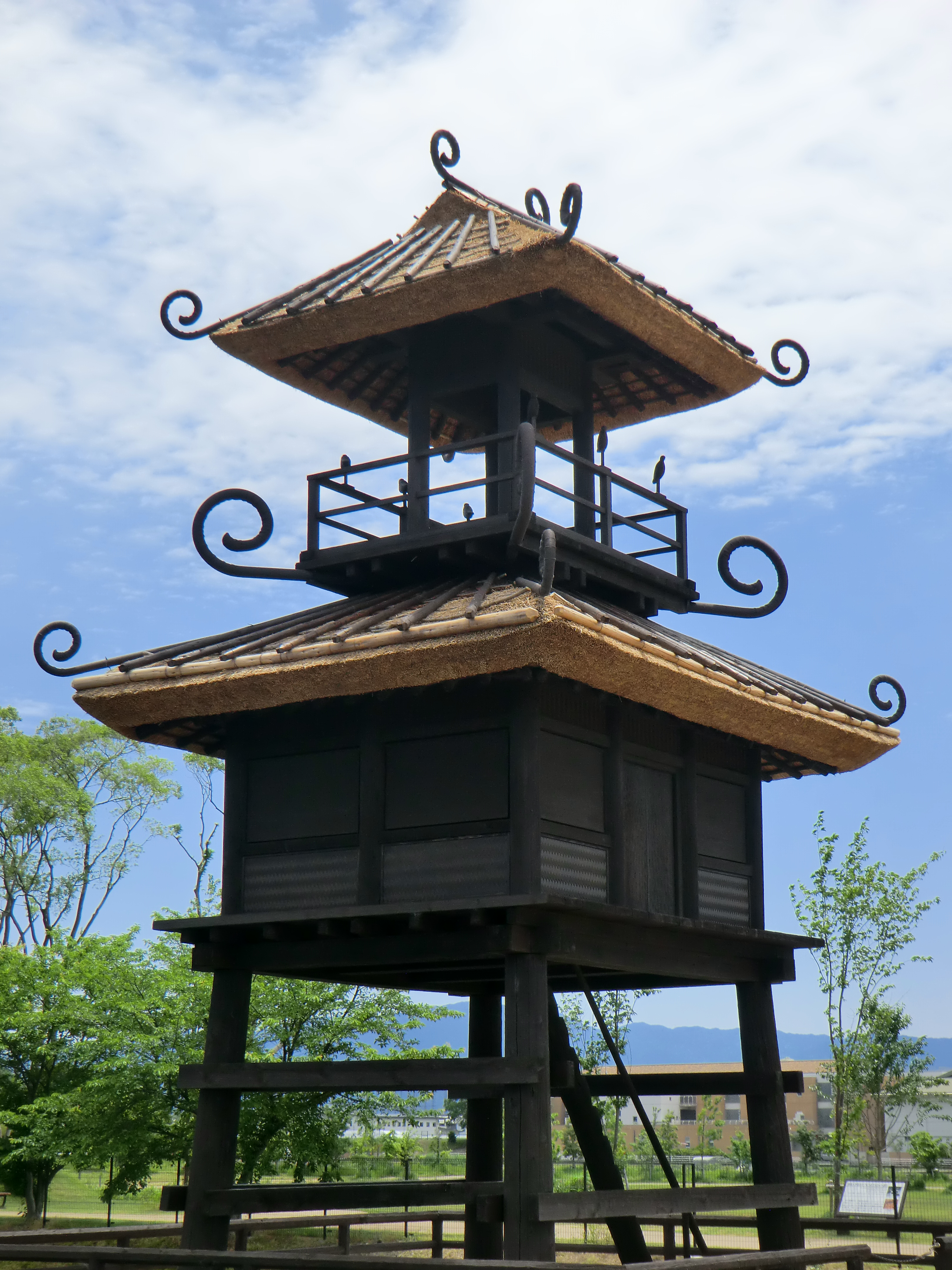 唐古・鍵遺跡史跡公園、紀元前1世紀頃の絵を元に復元した楼閣。